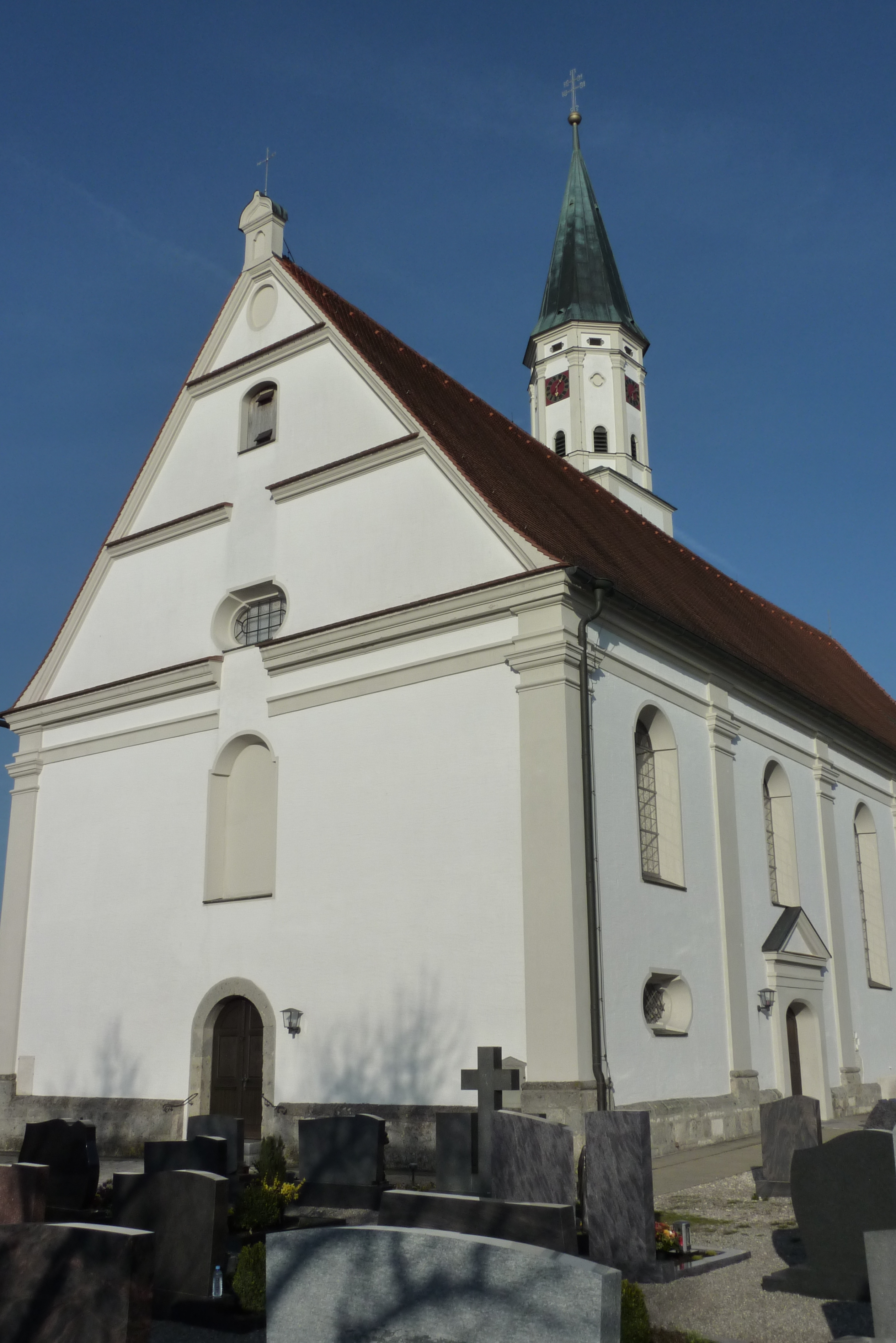 Katholische Pfarrkirche St. Martin in Blindheim, Ansicht von Südwesten